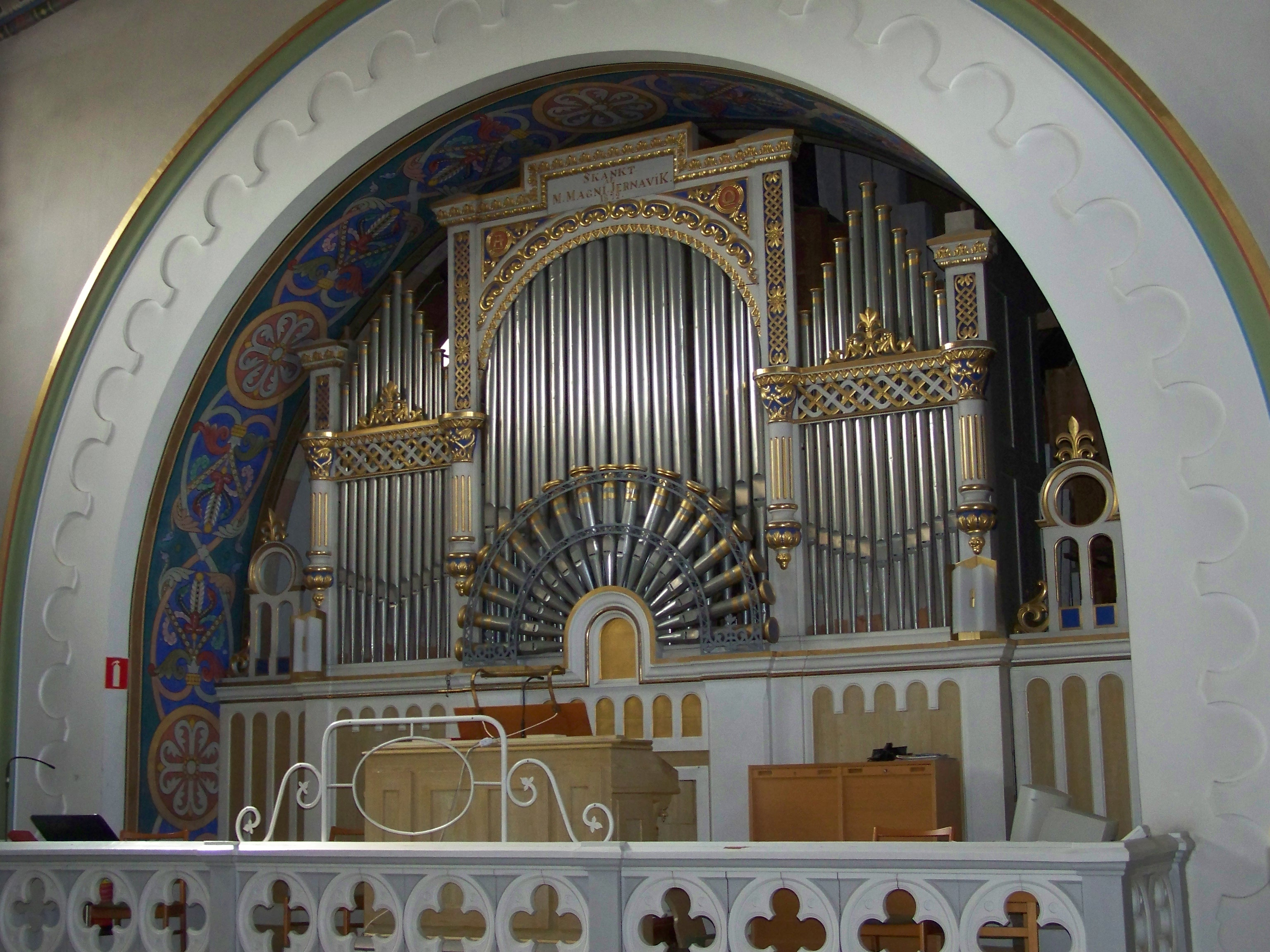 Bräkne-Hoby,_KircheOrgel von der Seite